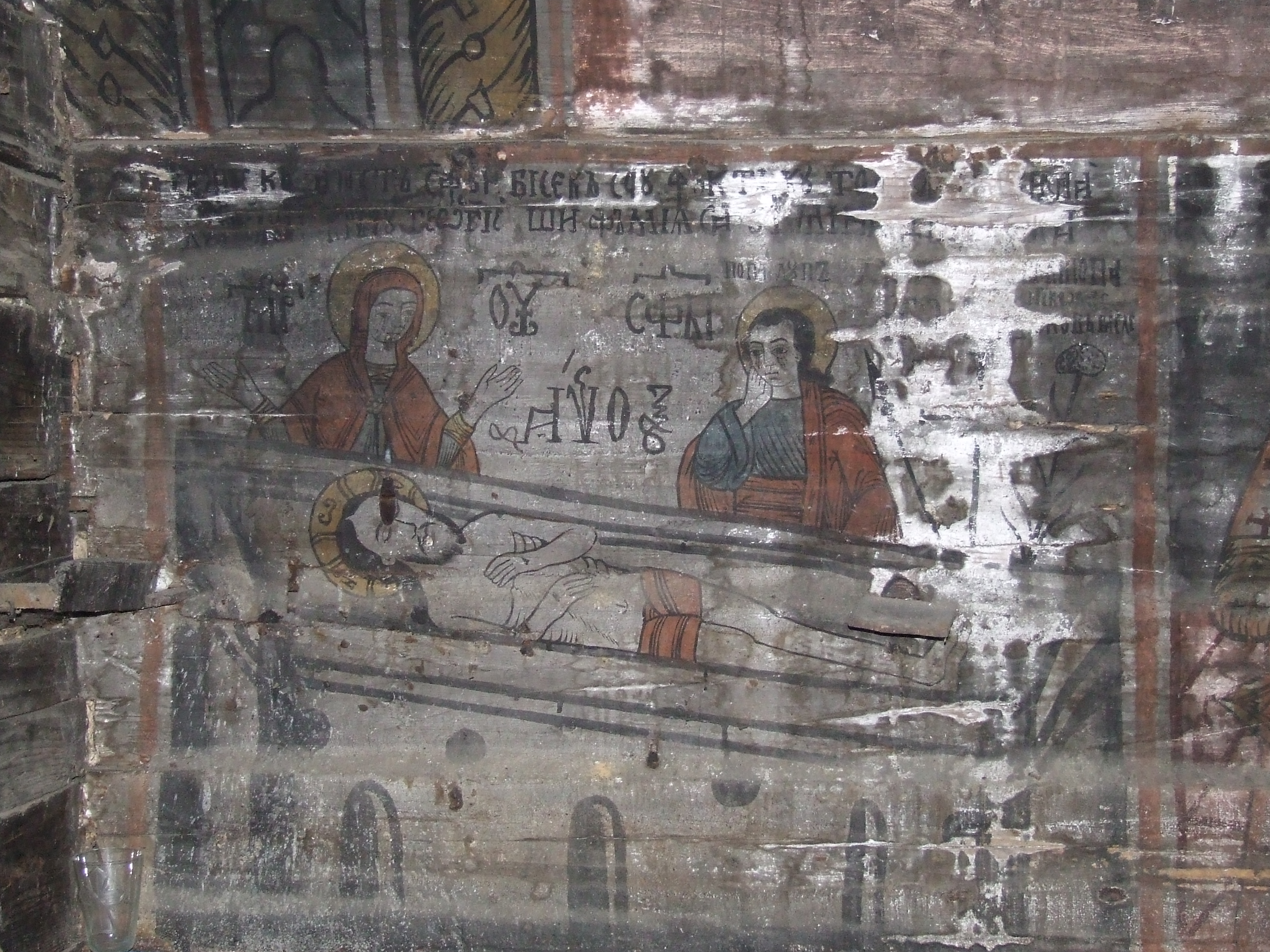 Die Holzkirche Sfinții Arhangheli Mihail și Gavriil von Găbud, Kreis Alba in RumänienRomână: Biserica de lemn Sfinții Arhangheli Mihail și Gavriil din Găbud, județul Alba, România